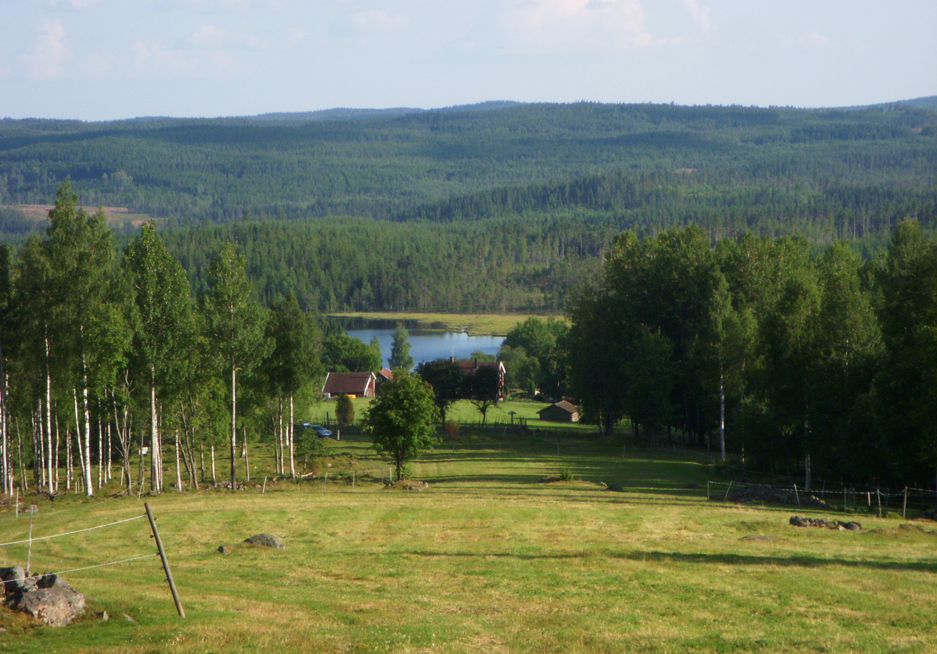 Finngården Rikkenstorp